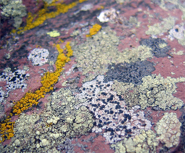 Lišaj na Midžoru, Stara planina